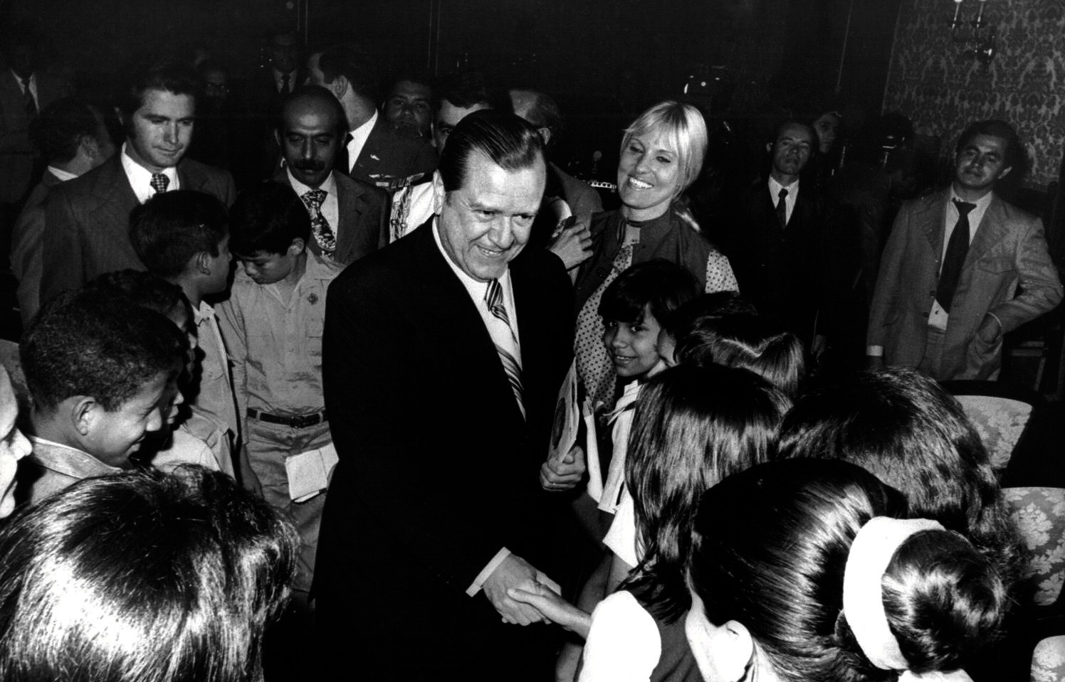 Rafael Caldera compartiendo con estudiantes del Grupo Escolar Caracciolo Parra León, en el Salón Boyacá del Palacio de Miraflores.